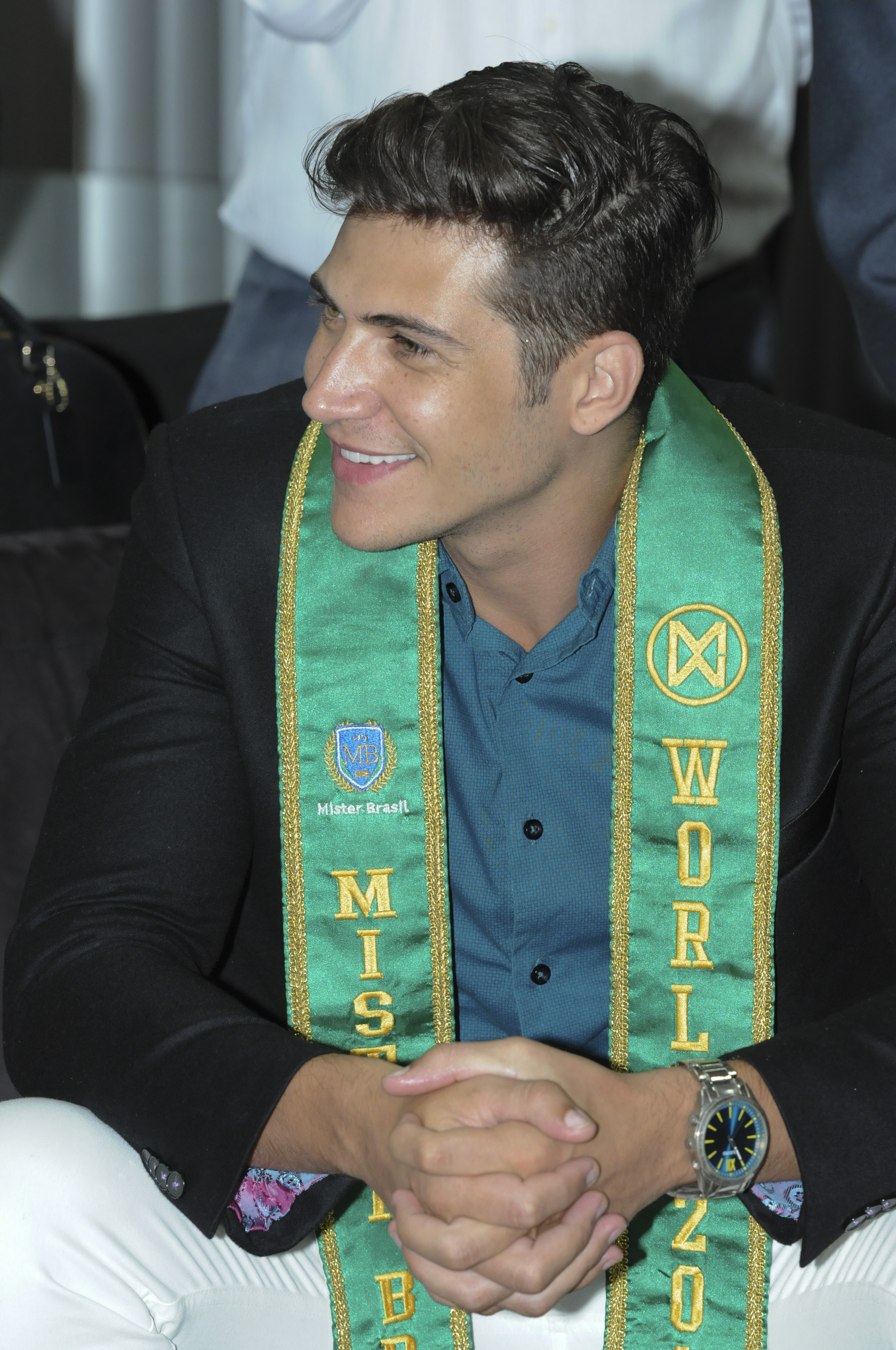 Palácio do Buriti, Brasília, DF, Brasil 16/4/2018 Foto: Renato Araújo/Agência Brasília. Em visita a Brasília para apoiar a Associação de Pais e Amigos dos Excepcionais do Distrito Federal (Apae-DF), a vencedora do concurso Miss Mundo de 2017, a indiana Manushi Chhillar, foi recebida pelo governador Rodrigo Rollemberg na tarde desta segunda-feira (16). O Mister World Brasil de 2017, Carlos Franco.